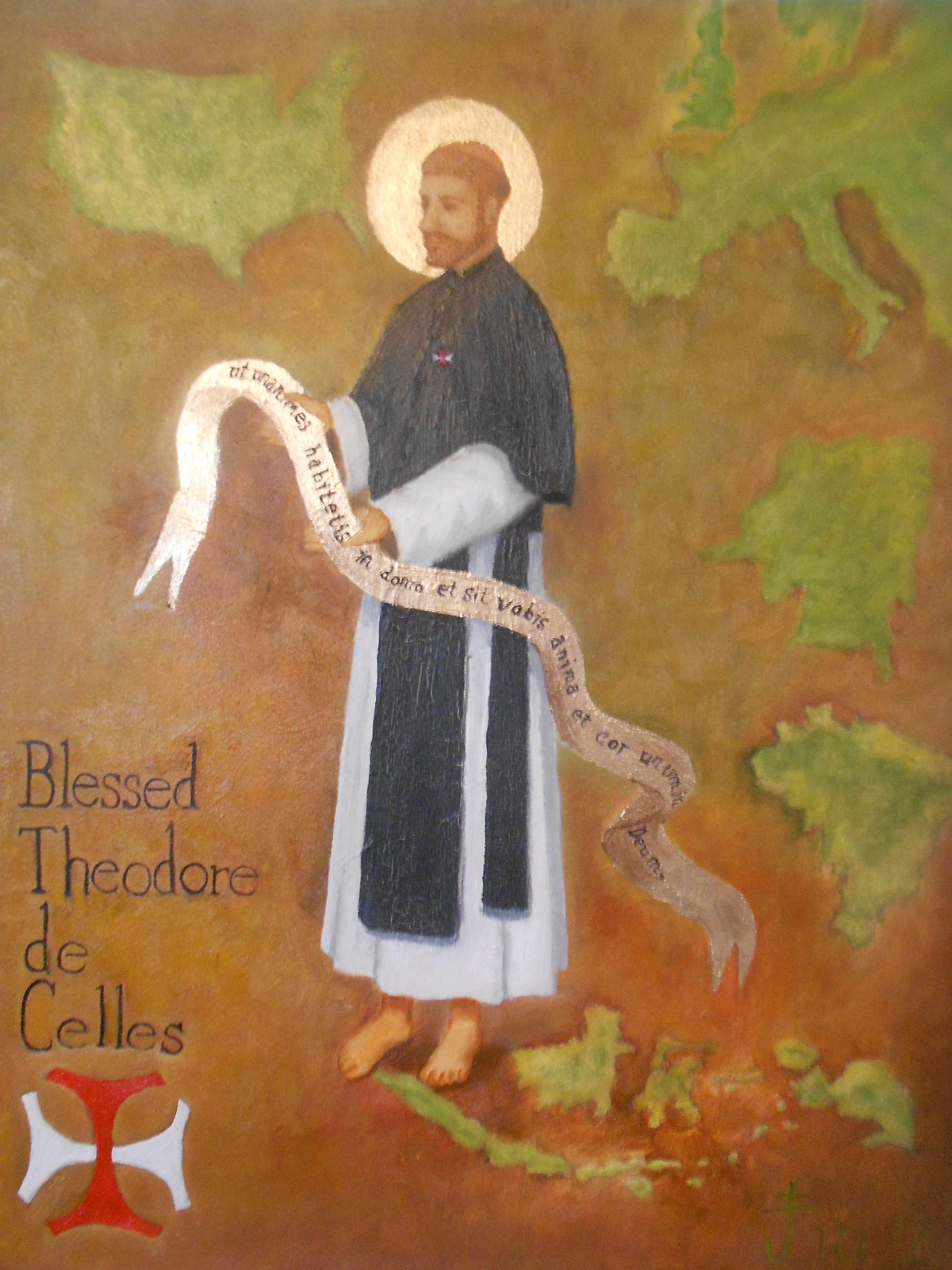 FUNDADOR DE LOS CROSIERS (CANONIGOS REGULARES DE LA ORDEN DE LA SANTA CRUZ)